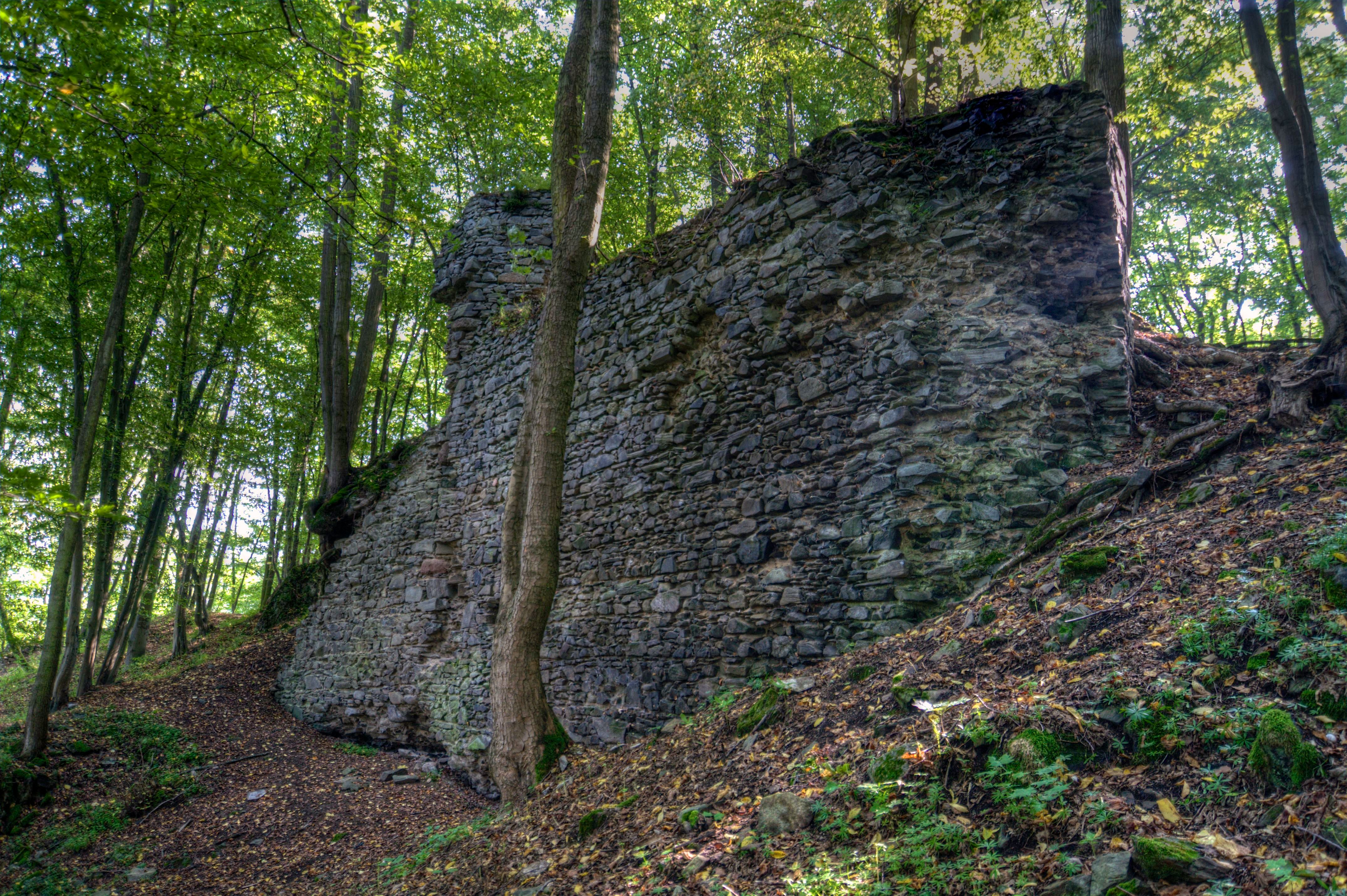 Stará Dubá - Severovýchodní zeď druhého nádvoří jádra hradu se zbytky druhé brány a závěru kaple